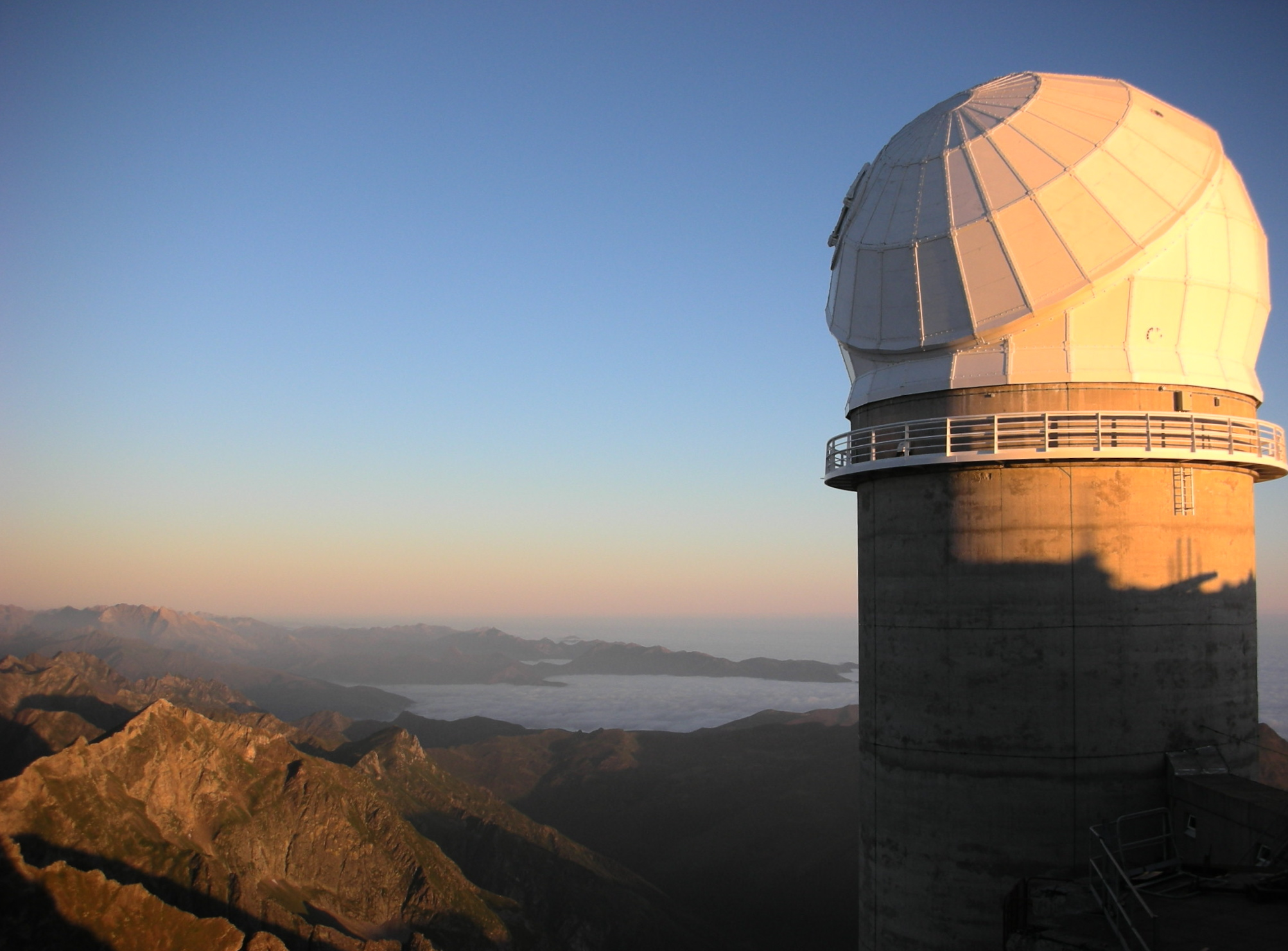 Télescope Bernard Lyot (Pic du Midi Observatory) at sunrise